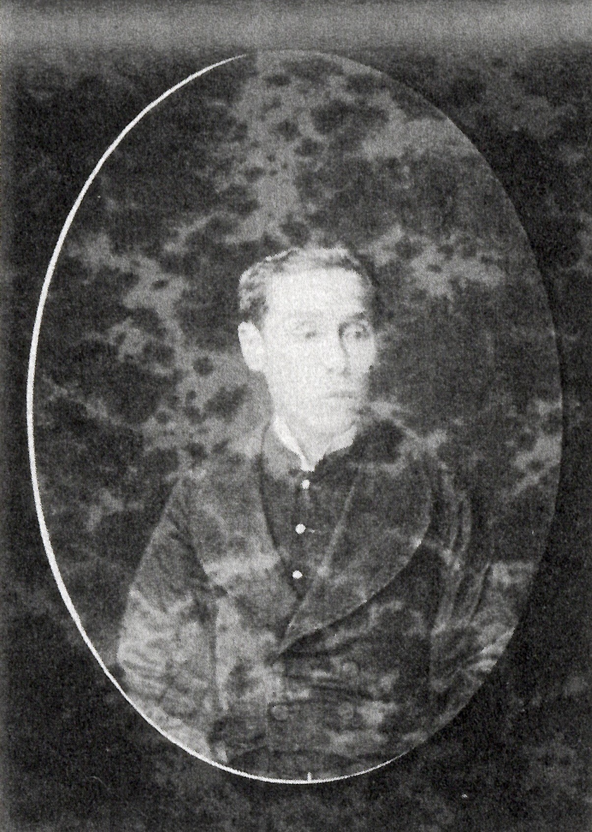 大関増徳の肖像写真。